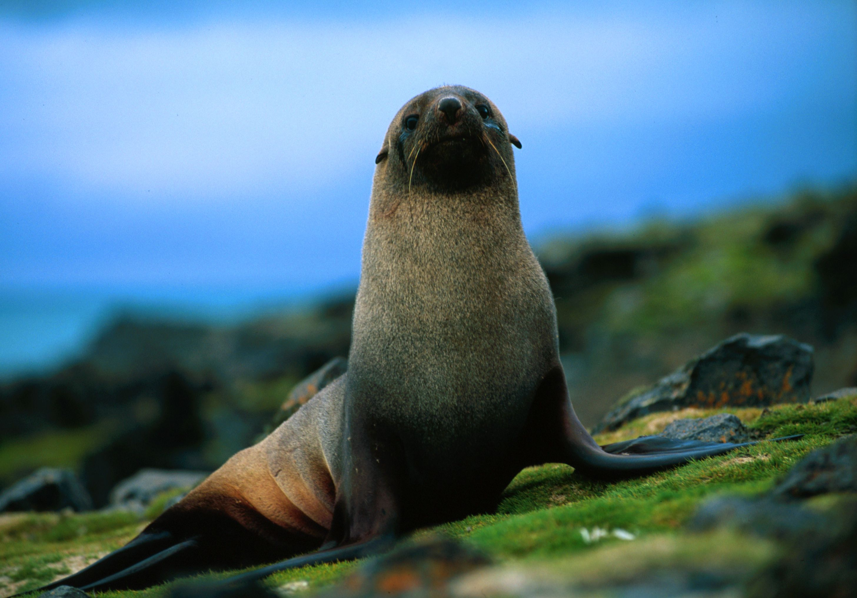 Fur Seal, Antarctic penninsula. Arctocephalus gazellafur seal - antarctic peninsula